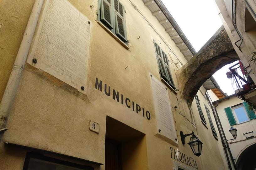 Castellaro, Liguria, Italia